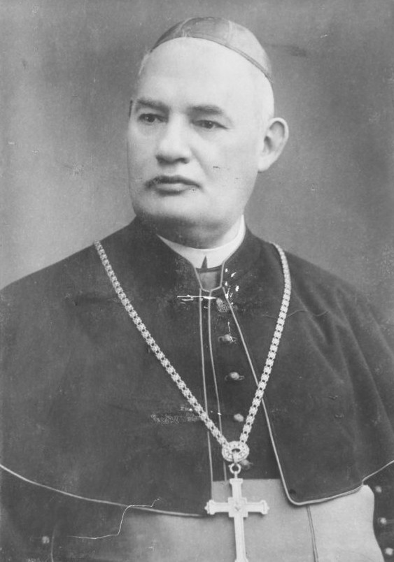 Karel Wisnar (1852 - 1926), Český kněz a profesor dogmatické teologie.